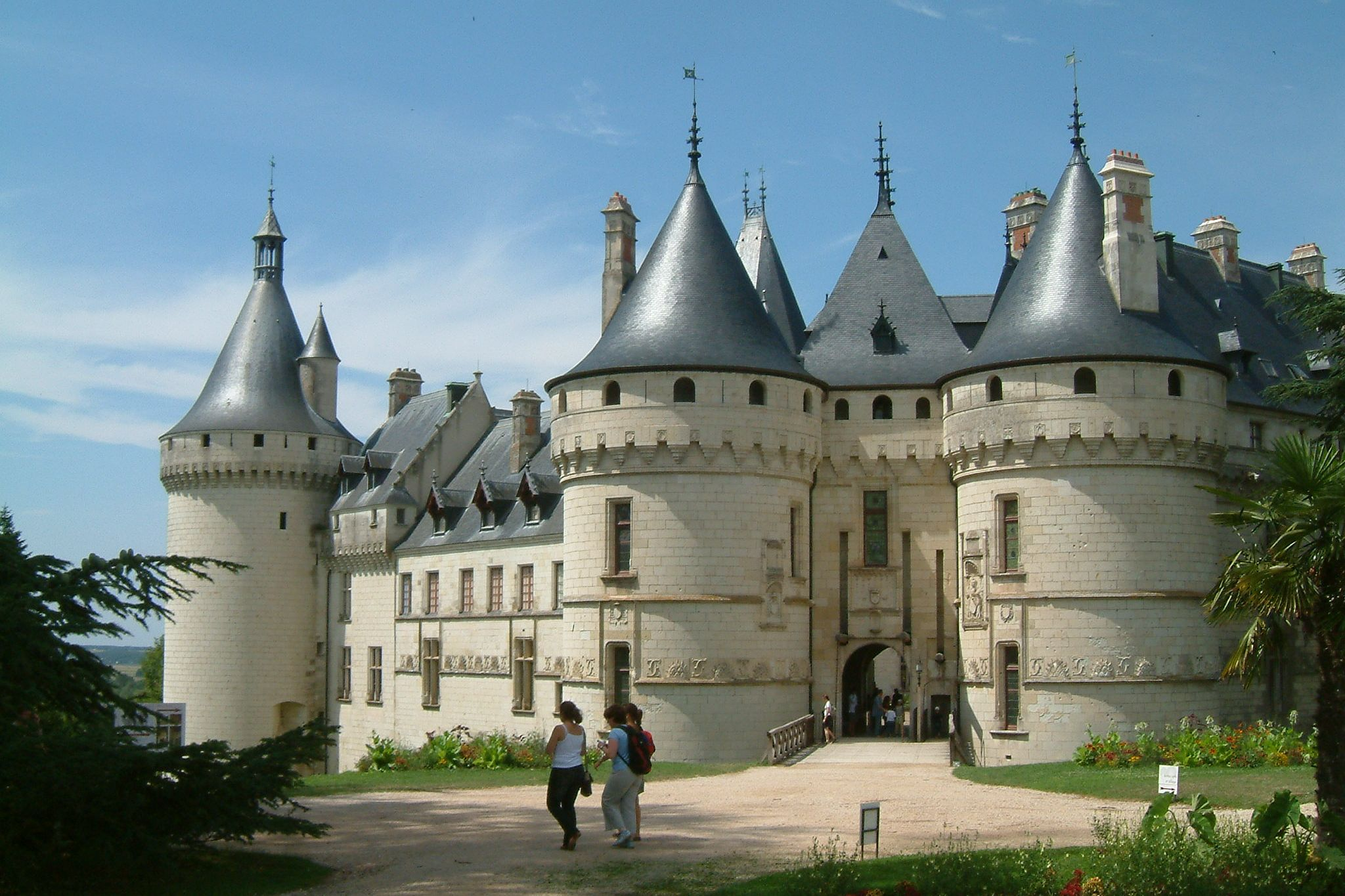 Schloss Chaumont, Frankreich